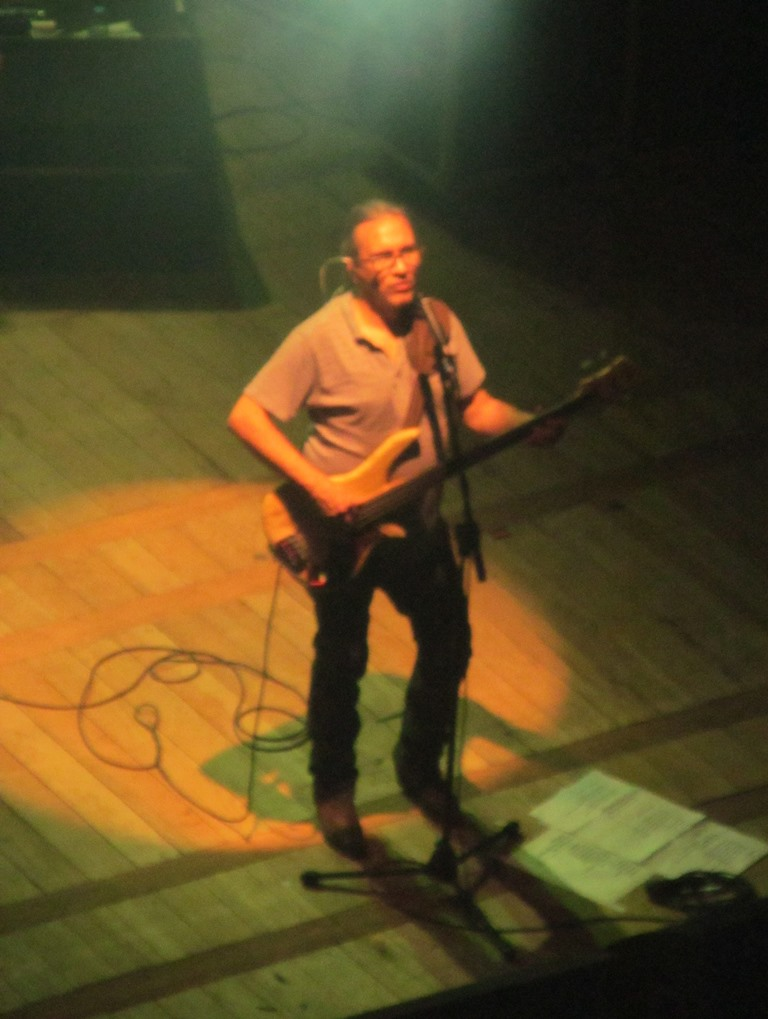 Marciano Cantero